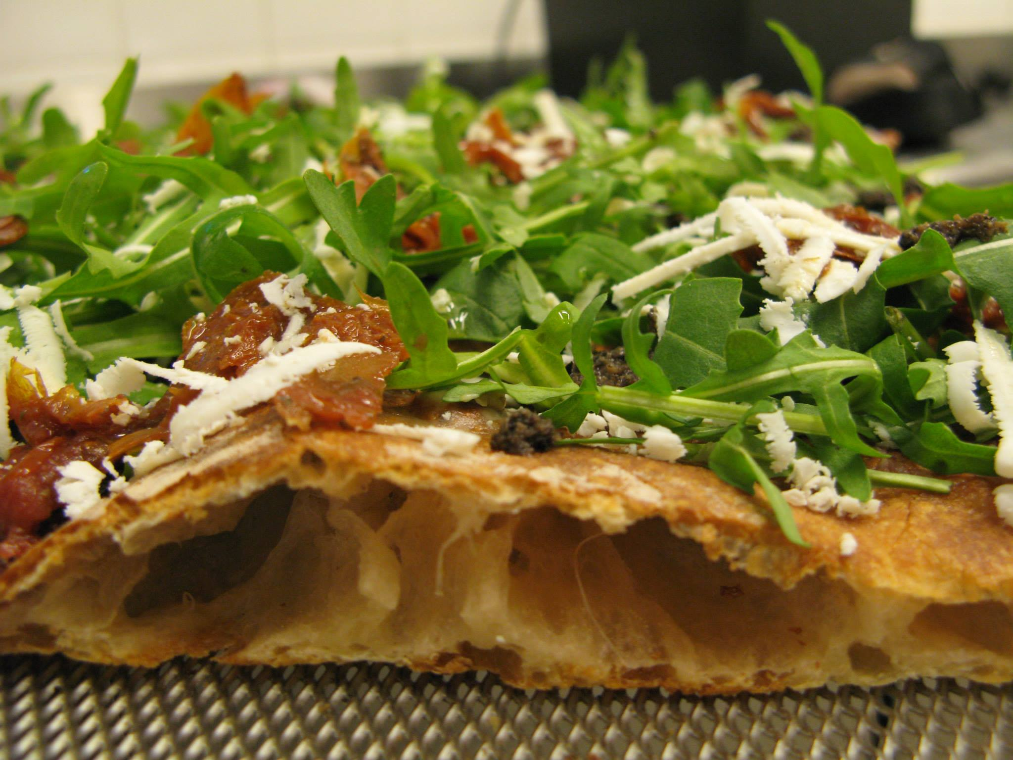 Pizza à la coupe avec roquette